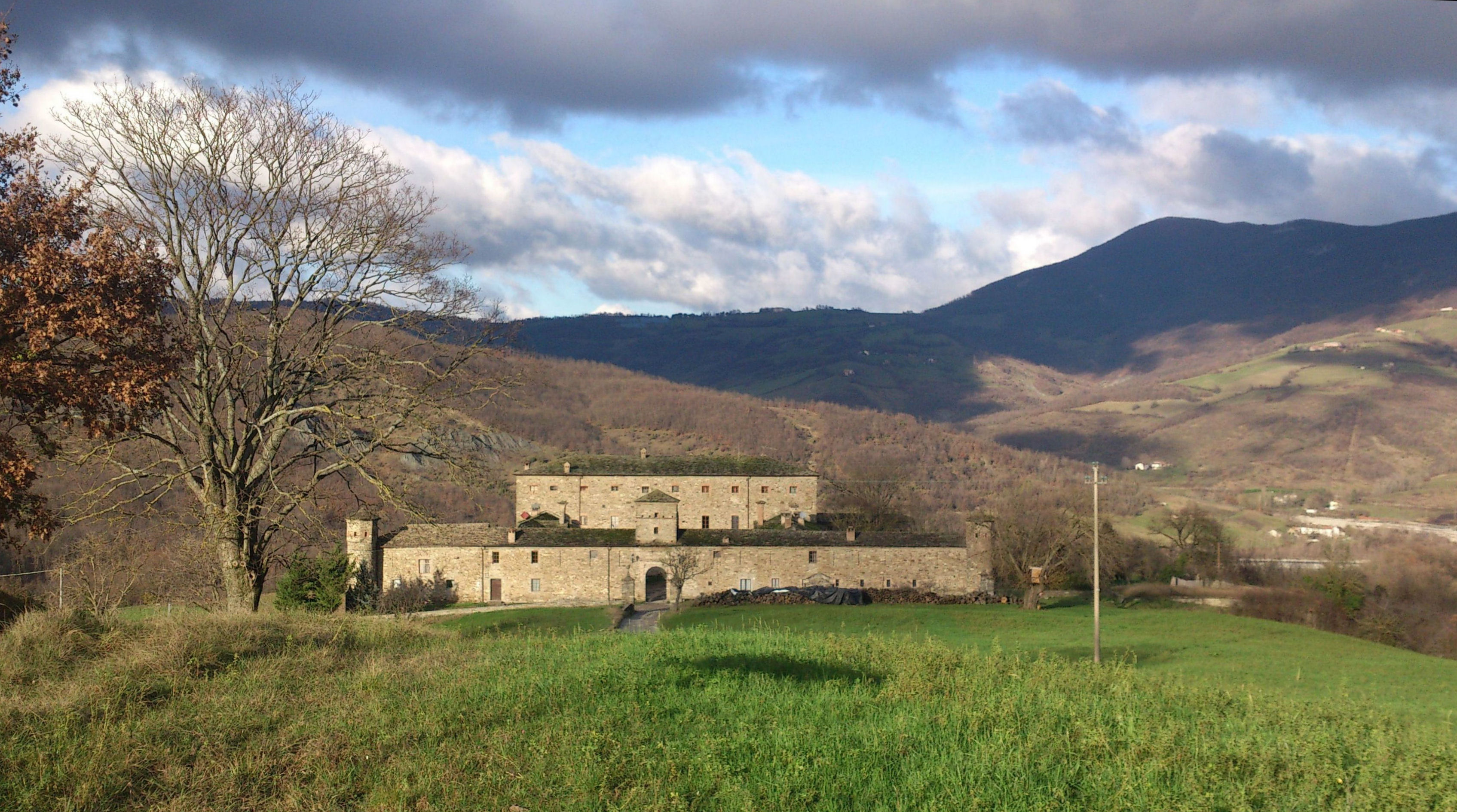 Veduta del castello di Golaso dalla strada provinciale.